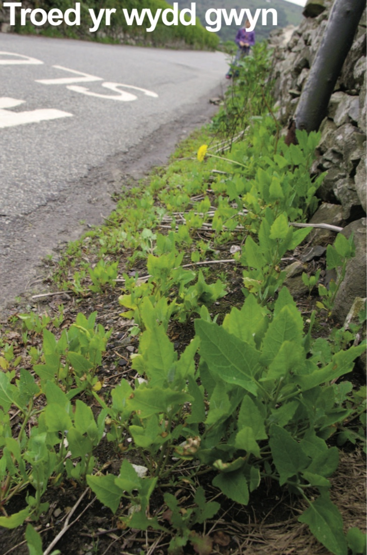 Troed yr ŵydd gwyn yn ymledu ar ffordd yn Waunfawr ar ôl gaeaf caled 2010 yn dilyn halltu’r ffyrdd yn helaeth.